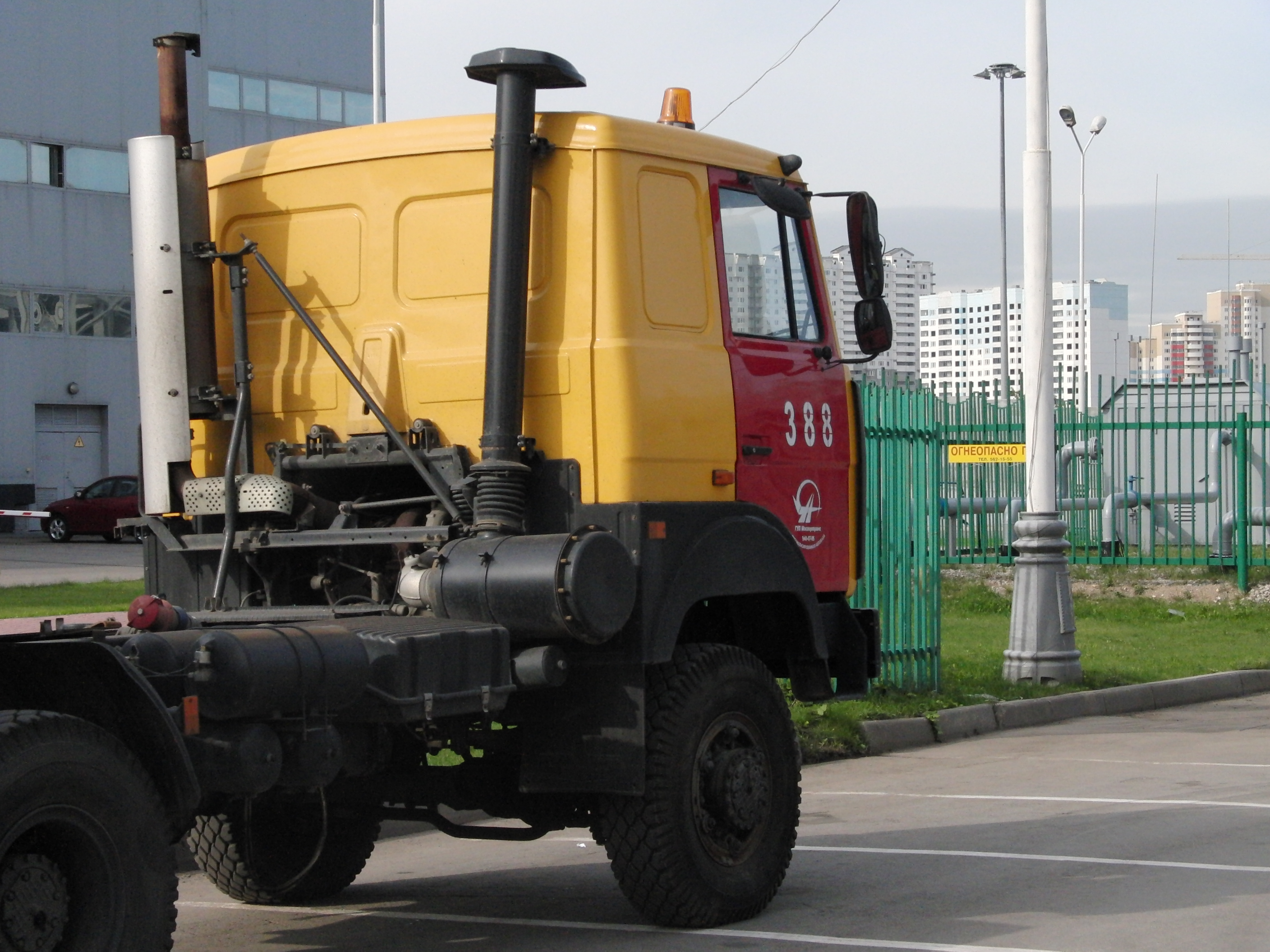 Mosgortrans truck